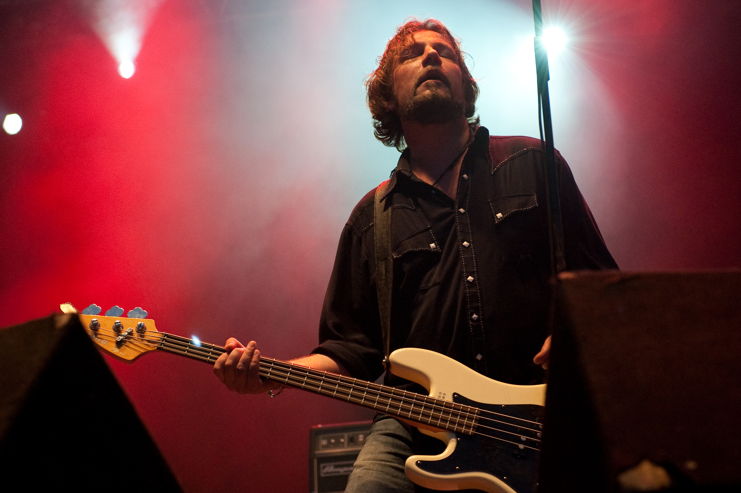 DumDum Boys